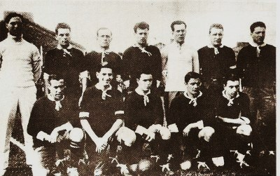 Club Atlético Independiente team, 1926 Primera División champion.